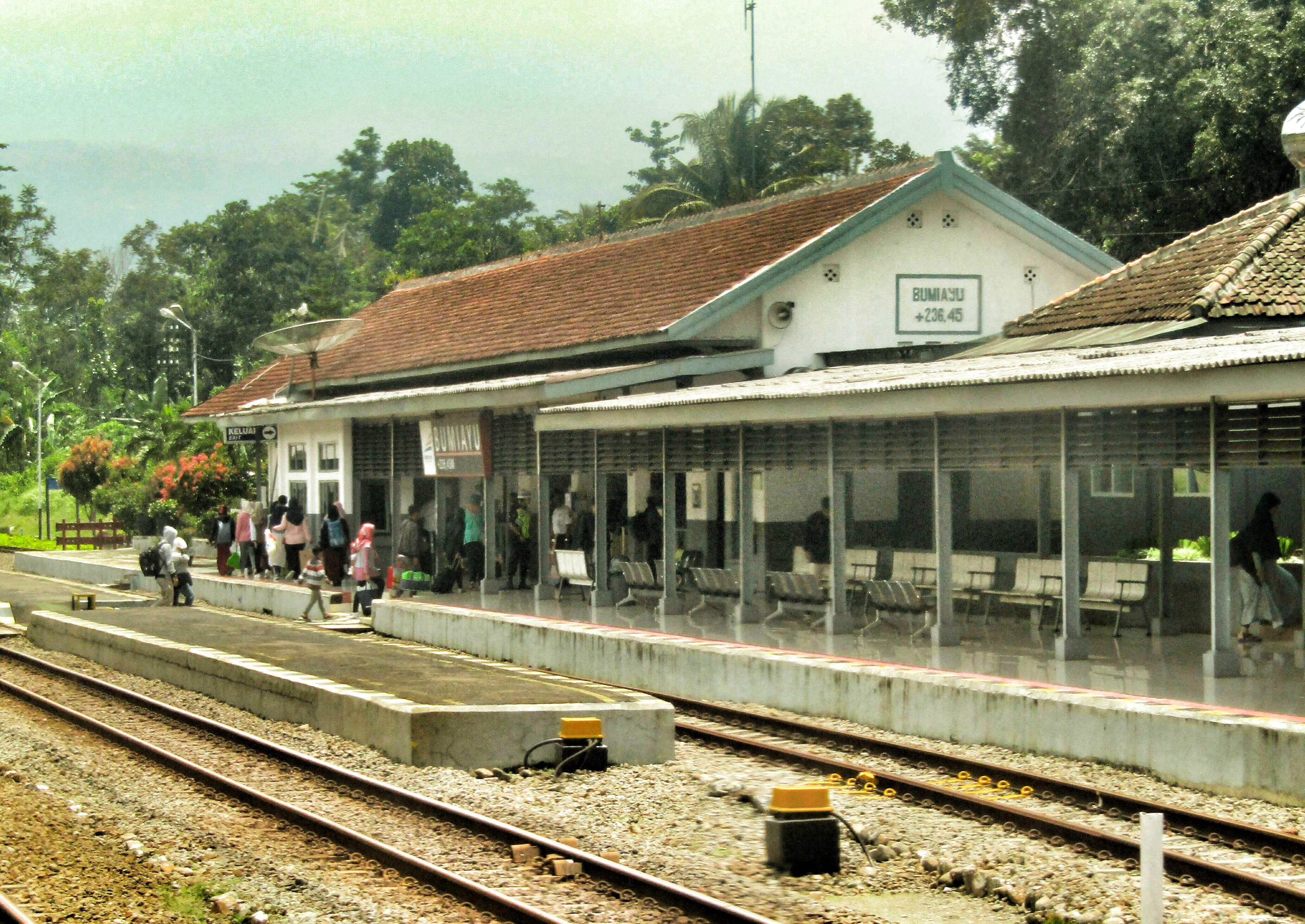 Tampak peron Stasiun Bumiayu, 2019